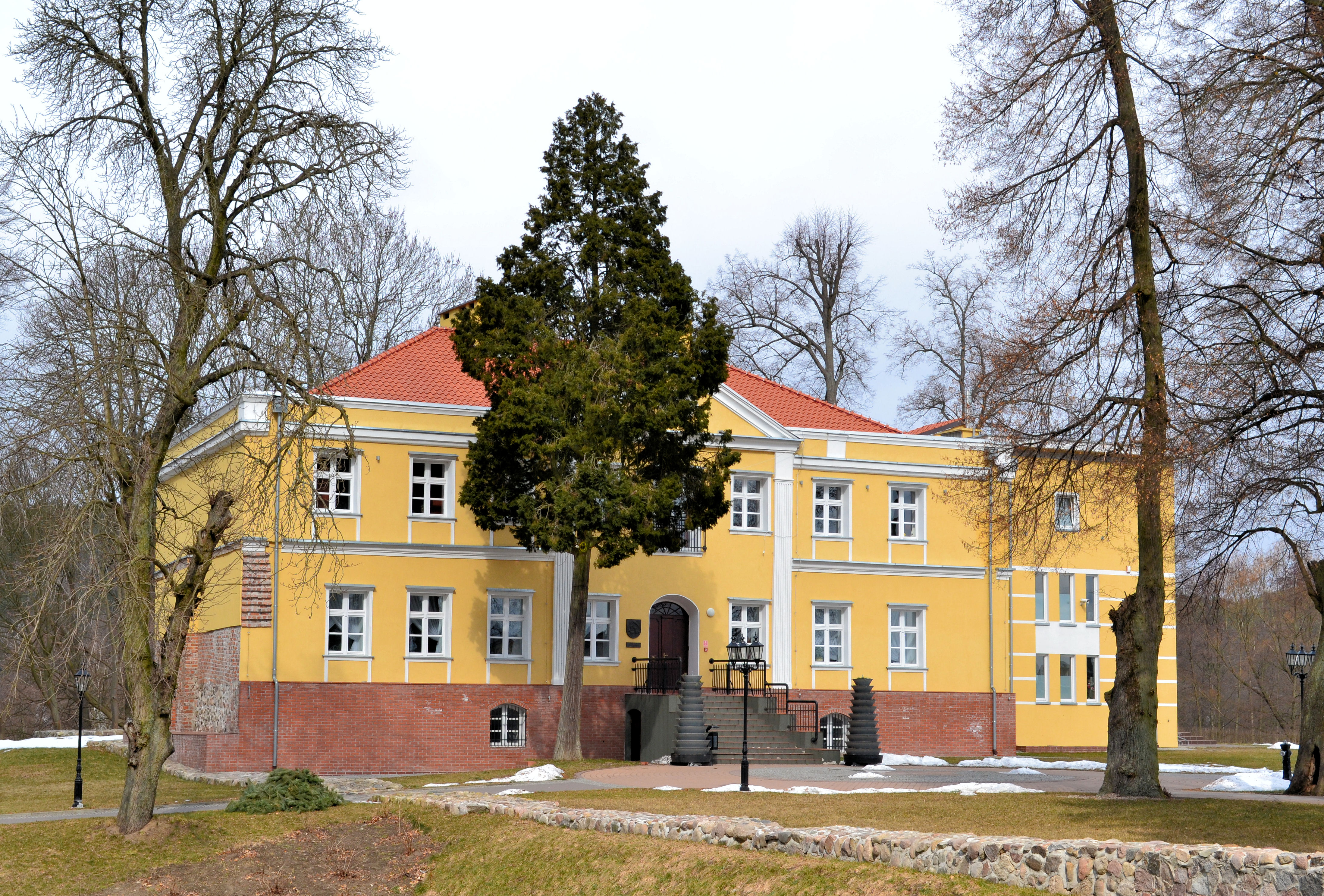 Kalisz Pomorski